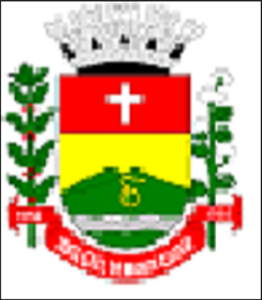 Brasão do Município de Santa Cruz de Monte Castelo.